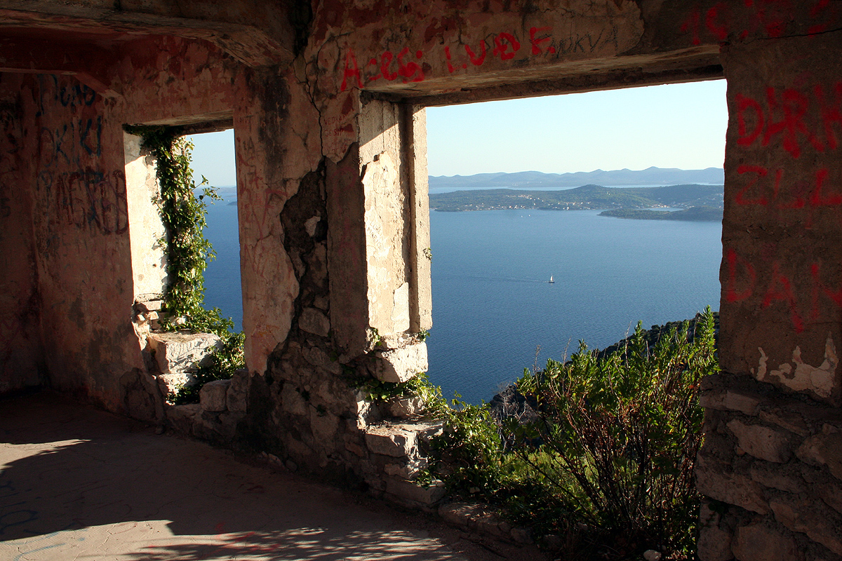 Iž, from st Mihovil fort, Ugljan